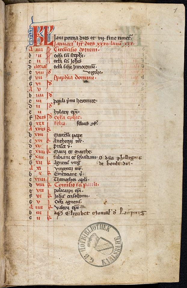 Kalenderblatt "Januar" aus dem Codex Lichtenthal 37, aus dem Wormser Kloster Kirschgarten, von der Nonne Anna von Bolanden (+ 1320) stammend.